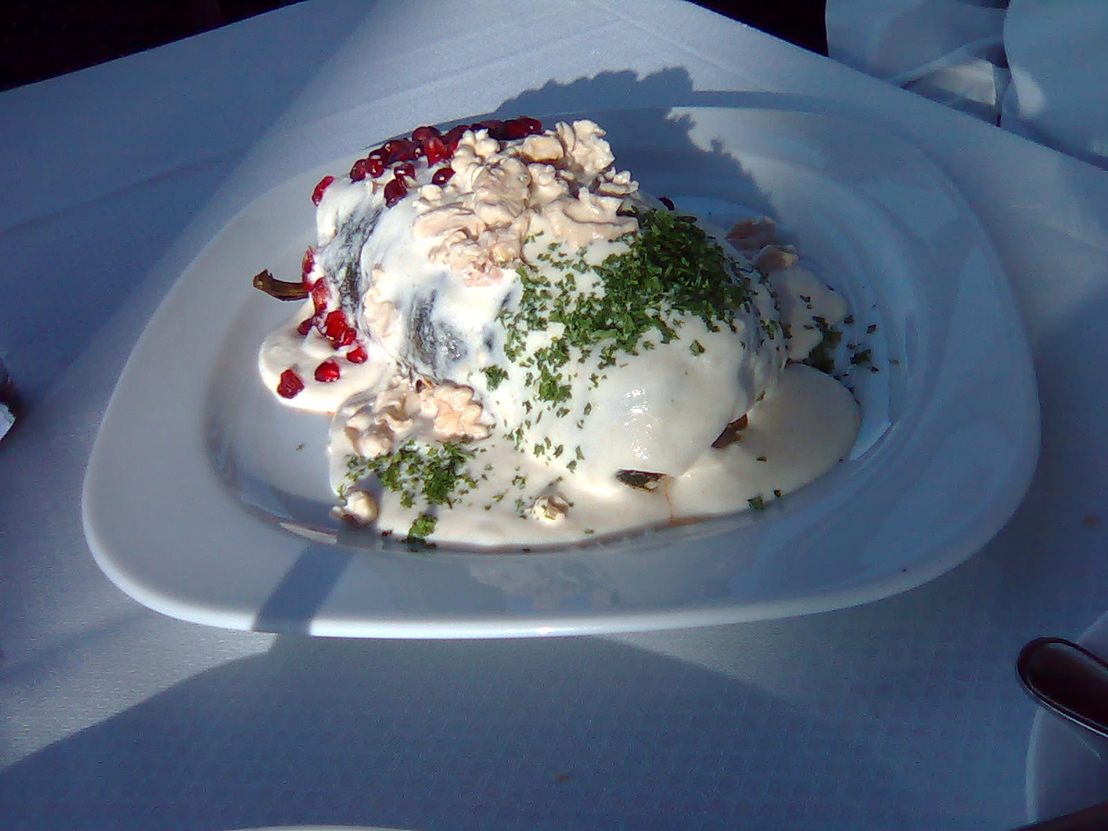 Platillo típico de la gastronomía mexicana. Es un chile poblano relleno de picadillo con frutas, cubierto con nogada, perejil, nuez y granada.